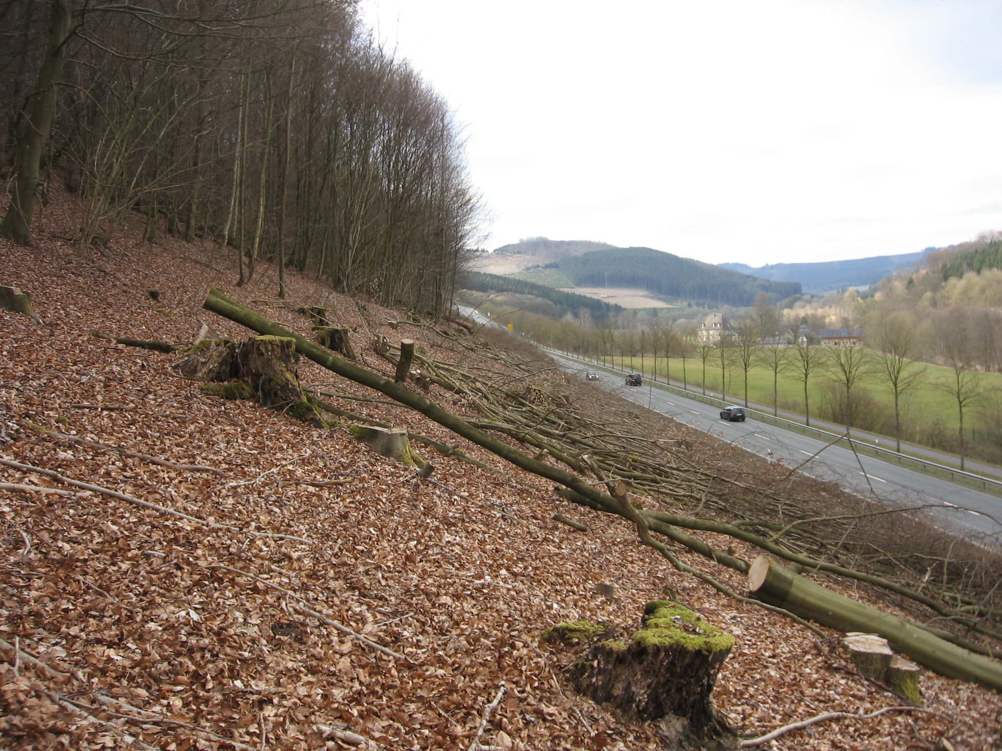 Totalkahlschlag auf einer Fläche im Besitz des Landes NRW am Kirchhagen. Rechts ist die B 55, dahinter Haus Wenne zu sehen.